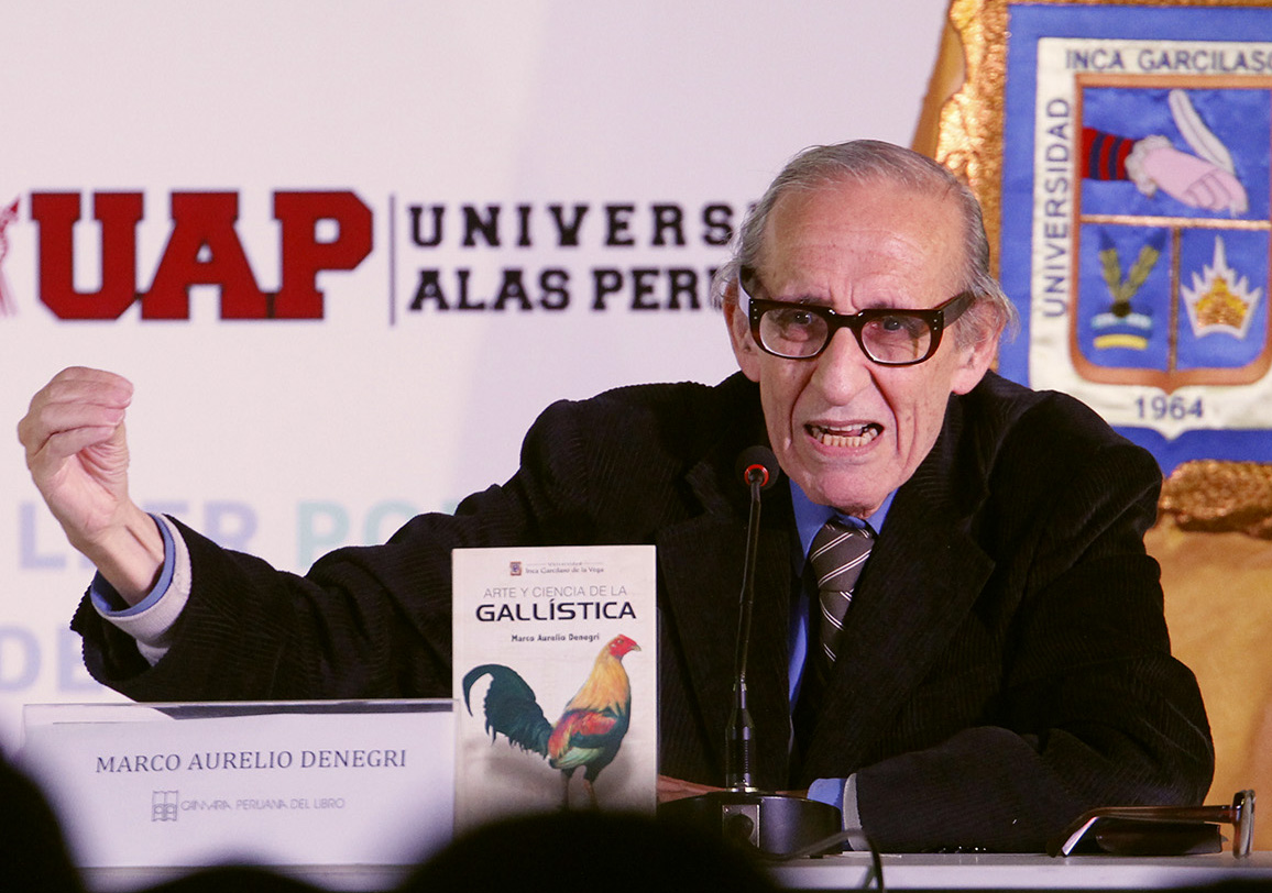 Marco Aurelio Denegri en la Feria del Libro Ricardo Palma, 2015.